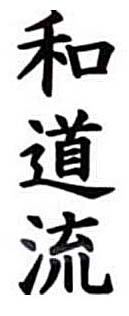 Der Karatestil Wado-ryu in Kanji geschrieben